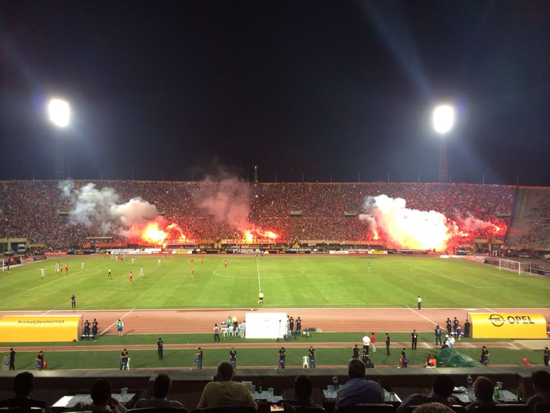 Galatasaray - Atleti maçından bir kare